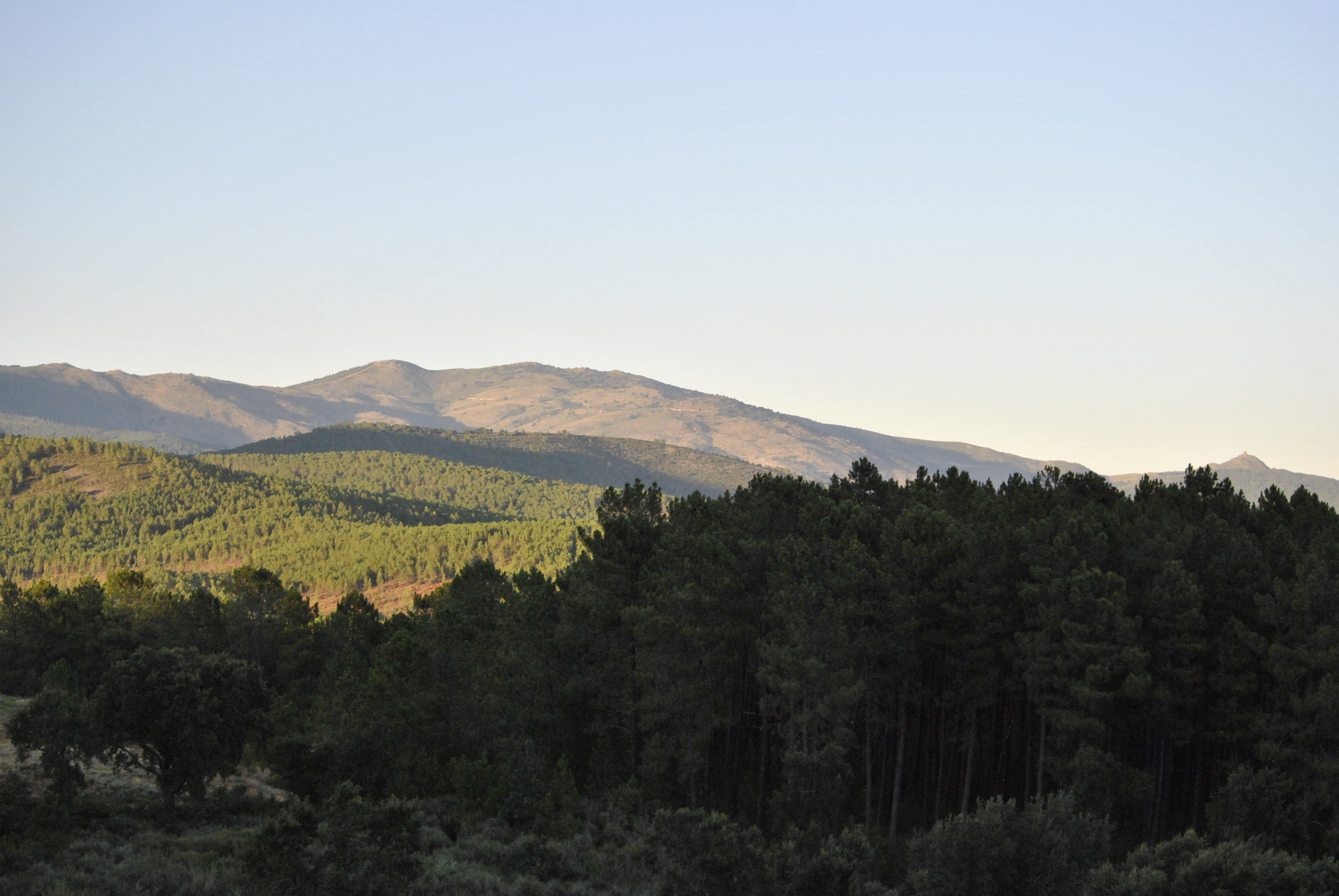 Sierra de Gata This is a photography of a Site of Community Importance in Spain with the ID: ES4320037. Natura2000 entry, EEA entry